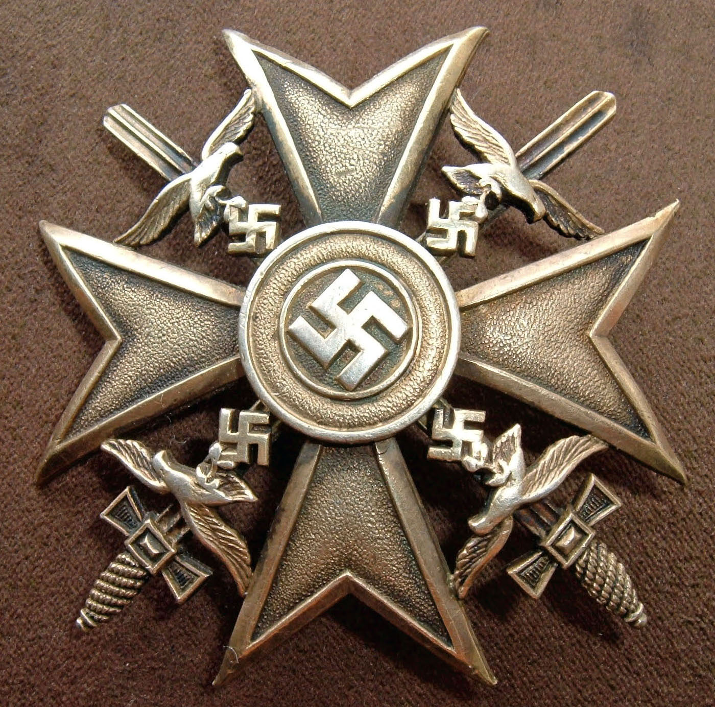 Creu d'or de la Legió Còndor original.